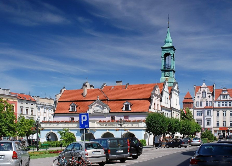 Ratusz w Kluczborku